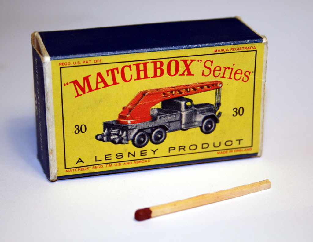 Schachtel eines Lesney- Modells